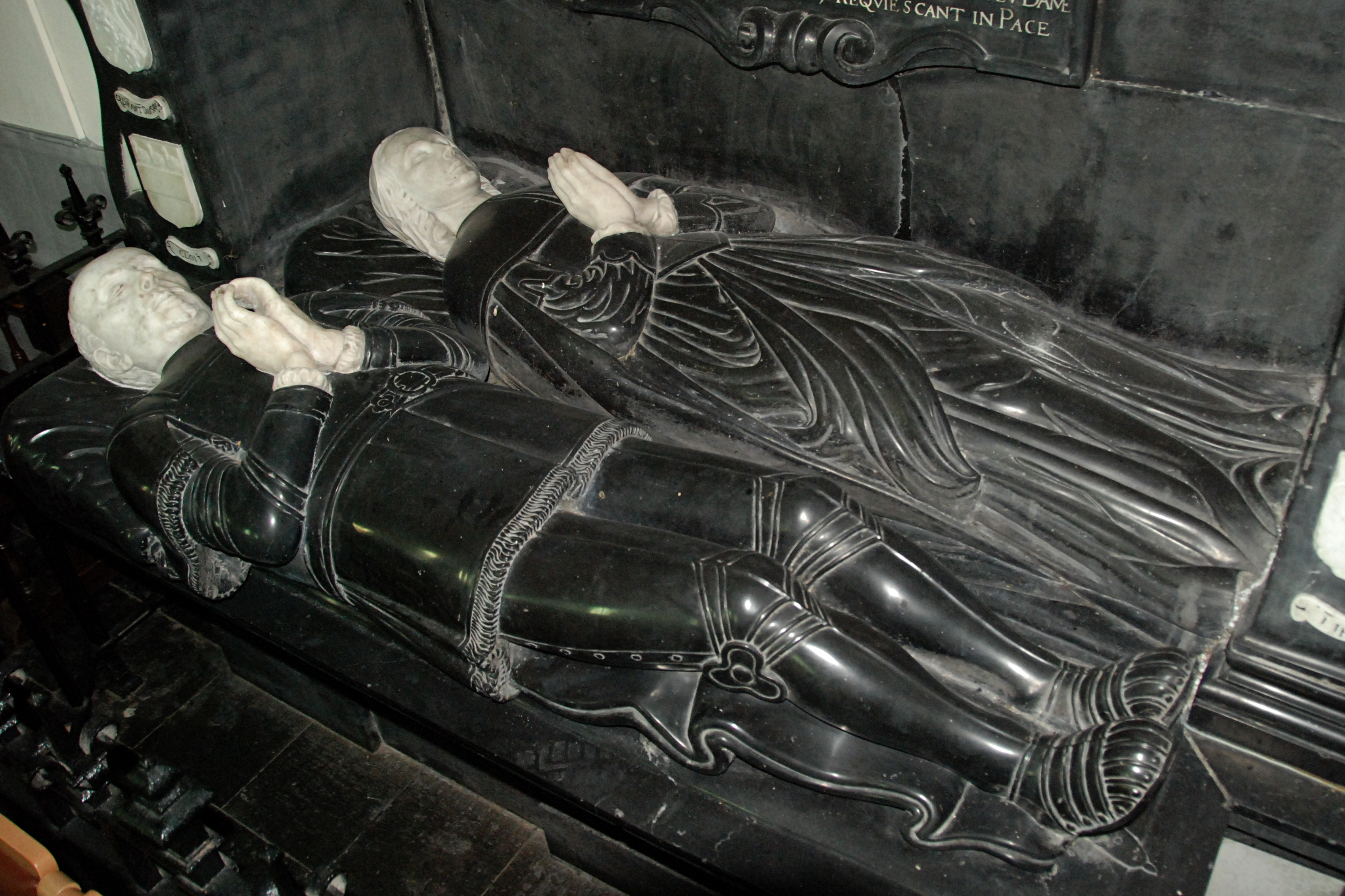 Belgique - Brabant wallon - Église de Court-Saint-Étienne - Enfeu de Louis de Provins